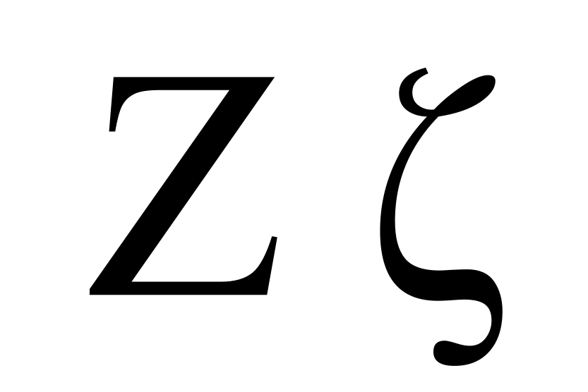 greek letter zeta